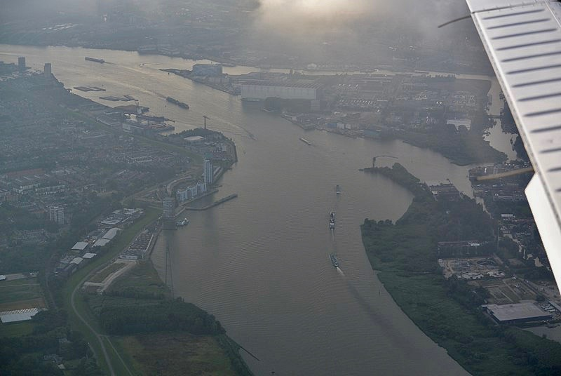 Luchtopname van de Nieuwe Maas tussen Oud IJsselmonde en industrieterrein Stormpolder, Rotterdam